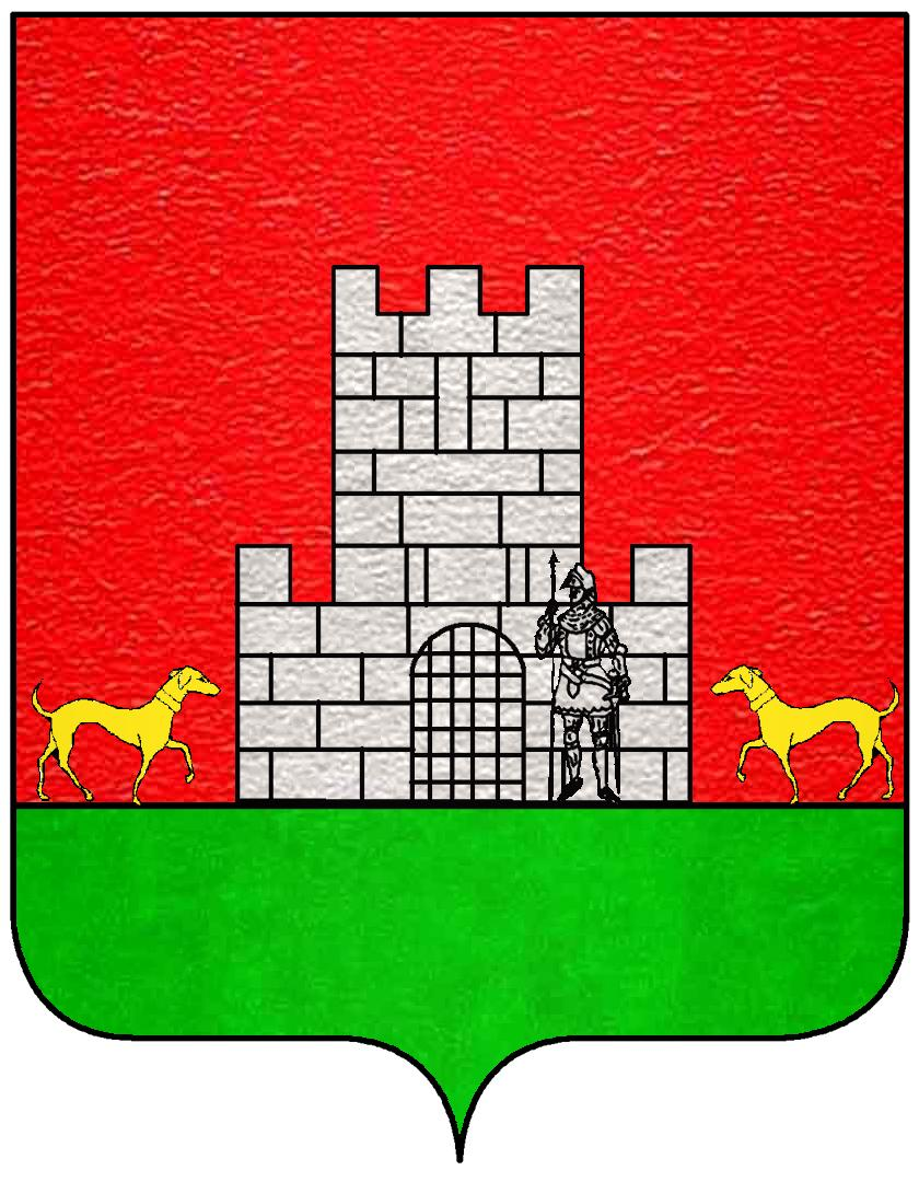 Stemma della famiglia Adragna